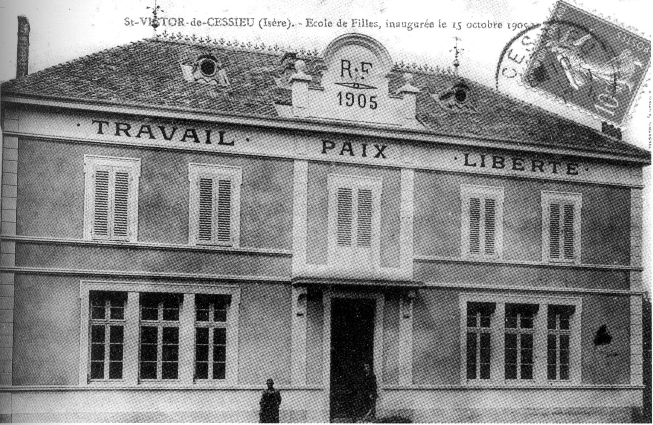 L'école des filles de Saint-Victor-de-Cessieu, inauguré le 15 octobre 1905, en 1907.